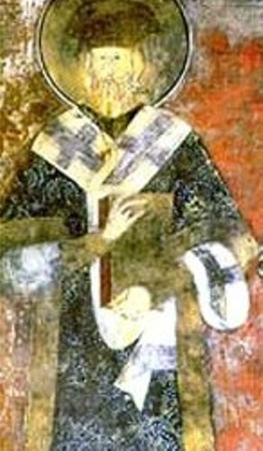 Srpskohrvatski / српскохрватски: Logotet kralja Dušana i prvi srpski patrijarh Joanikije II.